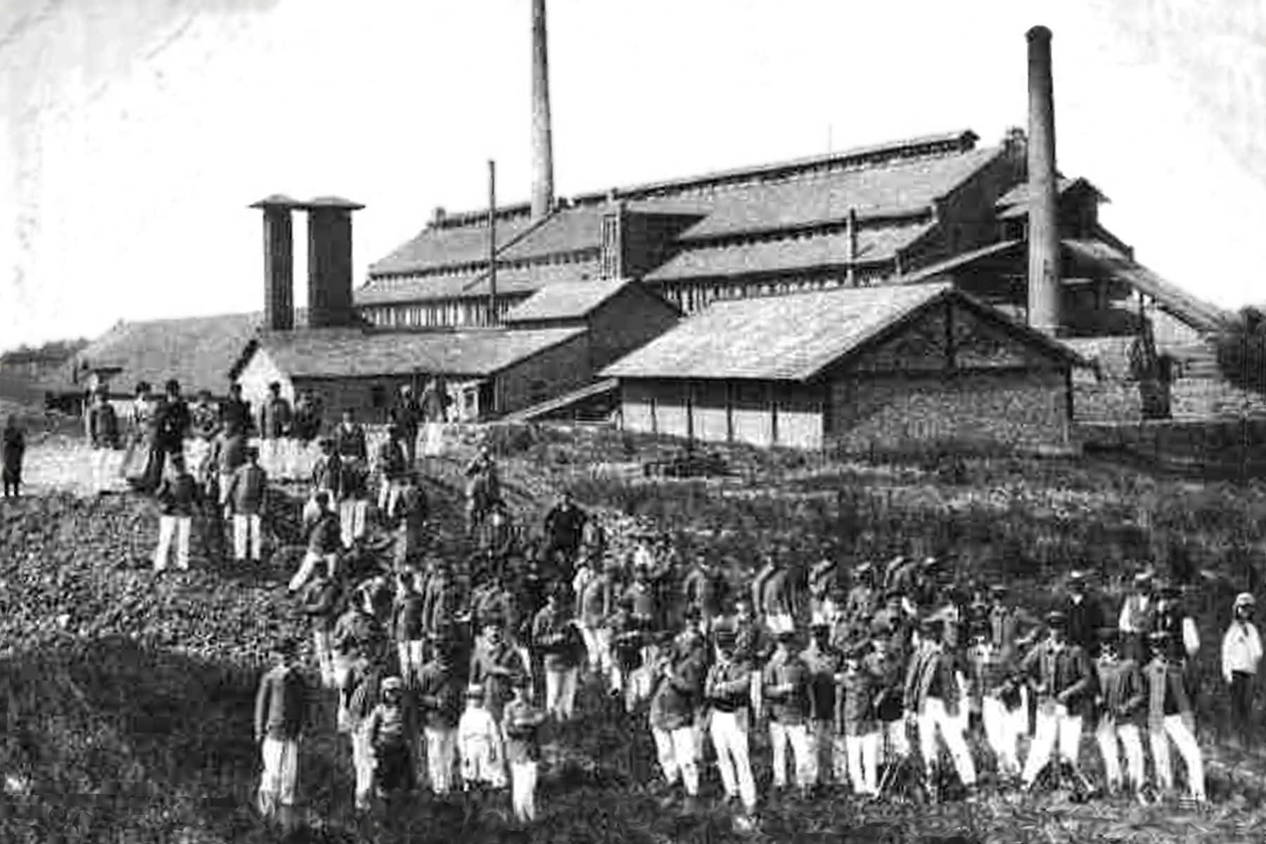 Ziegelfabrik Adt in Jeandelaincourt